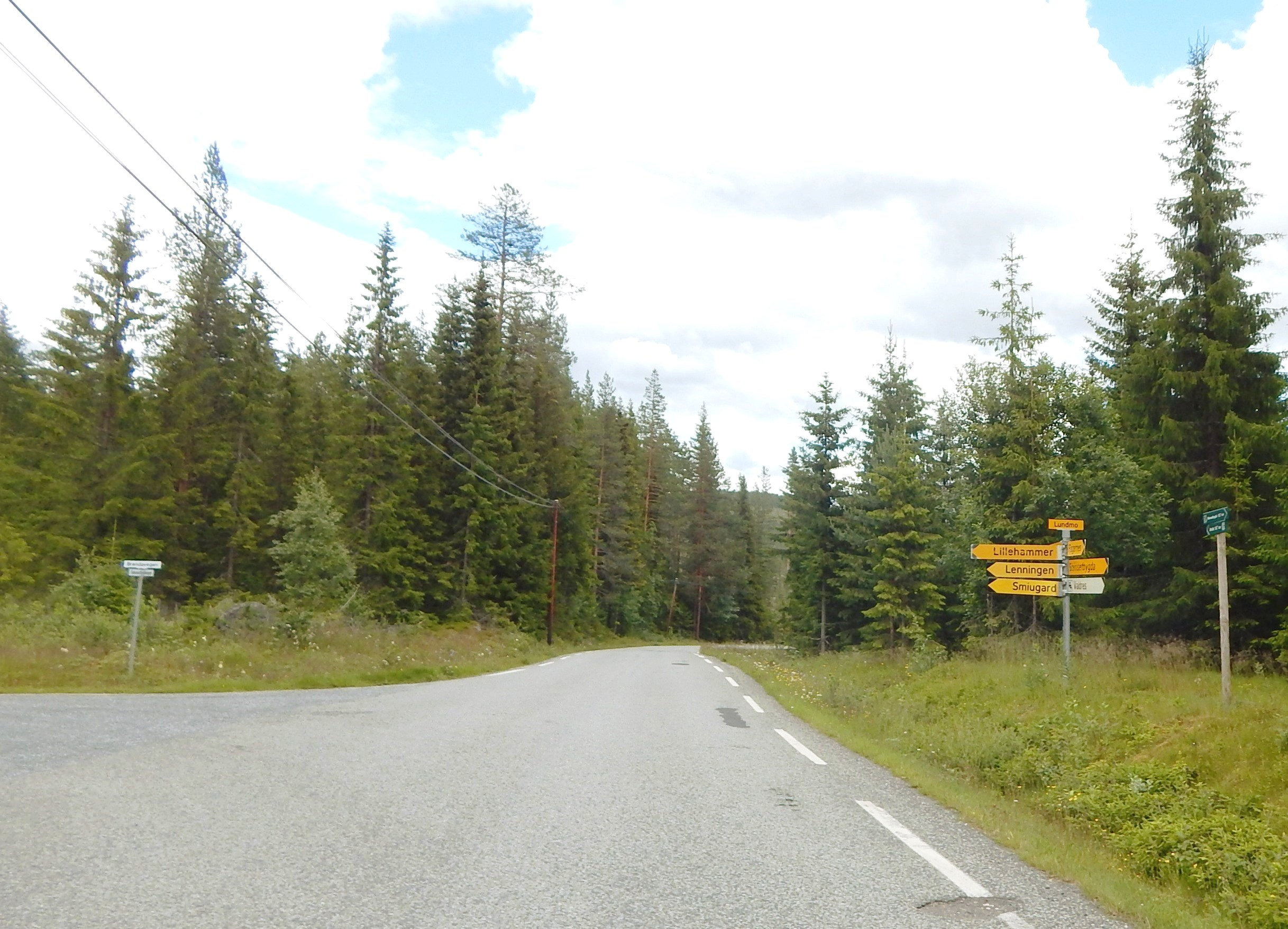 Krysset mellom fylkesvei 2442 (i forgrunnen og til venstre) og fylkesvei 2474 (rett frem)